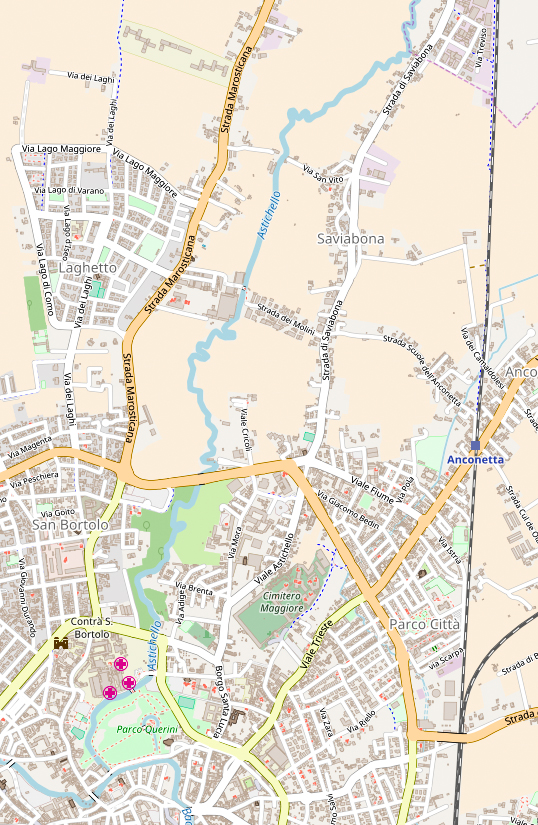 Mappa della Circoscrizione 4 - Vicenza